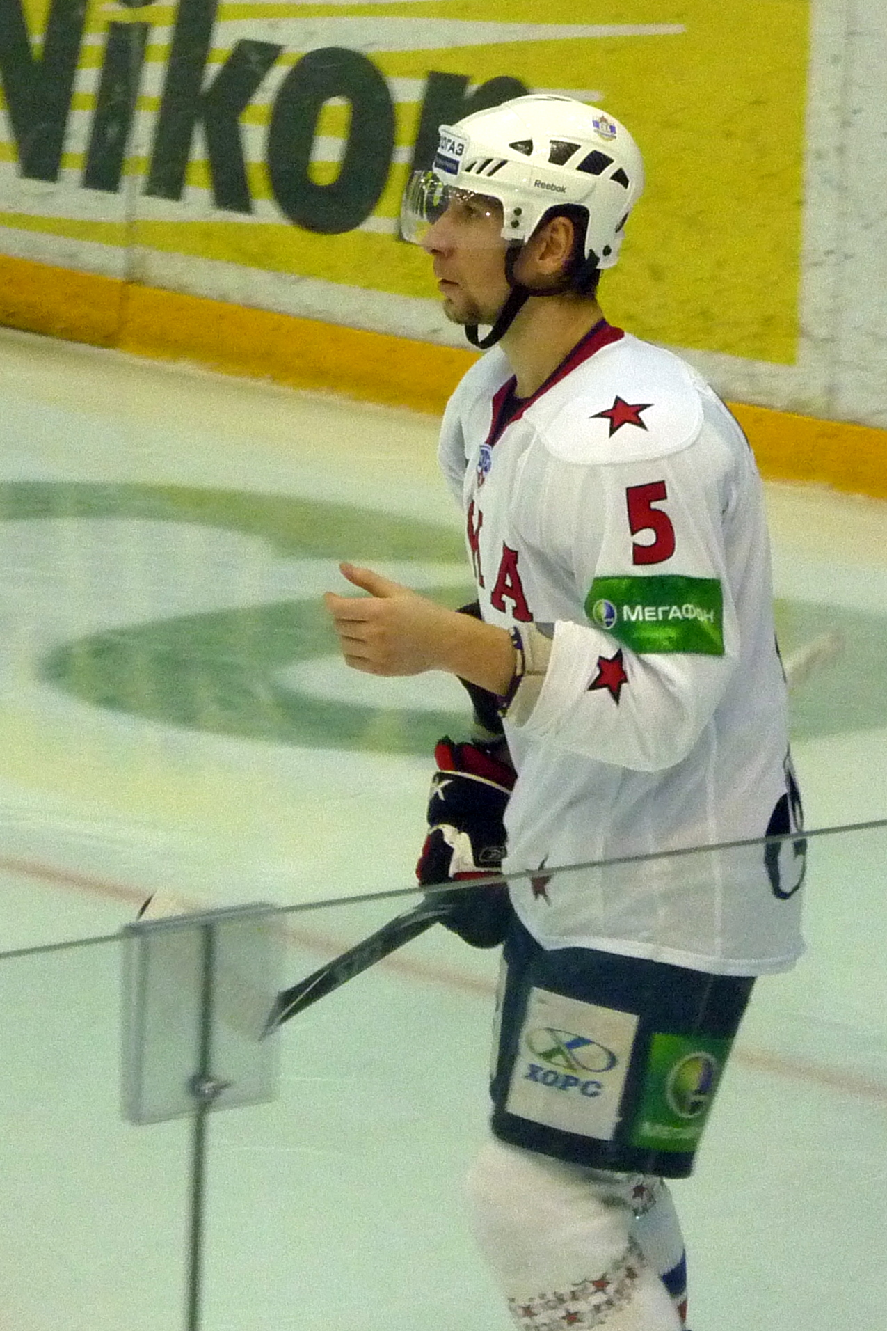 Защитник питерского СКА Виталий Вишневский в матче против нижегородского «Торпедо» 12 декабря 2010 года